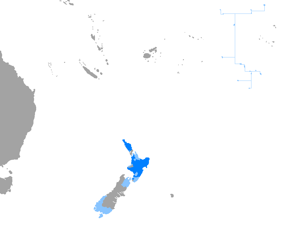 Idioma maorí